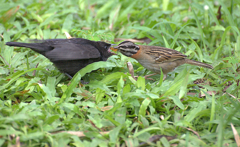 Shiny Cowbird(Molothrus bonariensis) chick being fed by adult (Zonotrichia capensis ). Parque da Independência, Museu do Ipiranga, São Paulo. Este é um Vira-Bosta sendo criado pelo Tico-Tico.